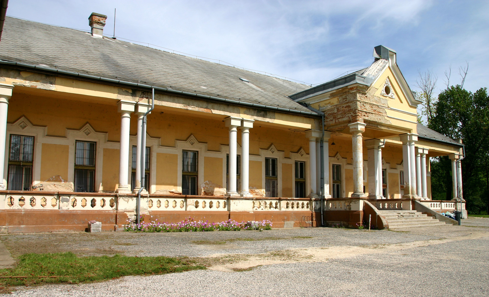 volt Zichy-kúria (Zichyújfalu, Kastélykert) This is a photo of a monument in Hungary. Identifier: 3974